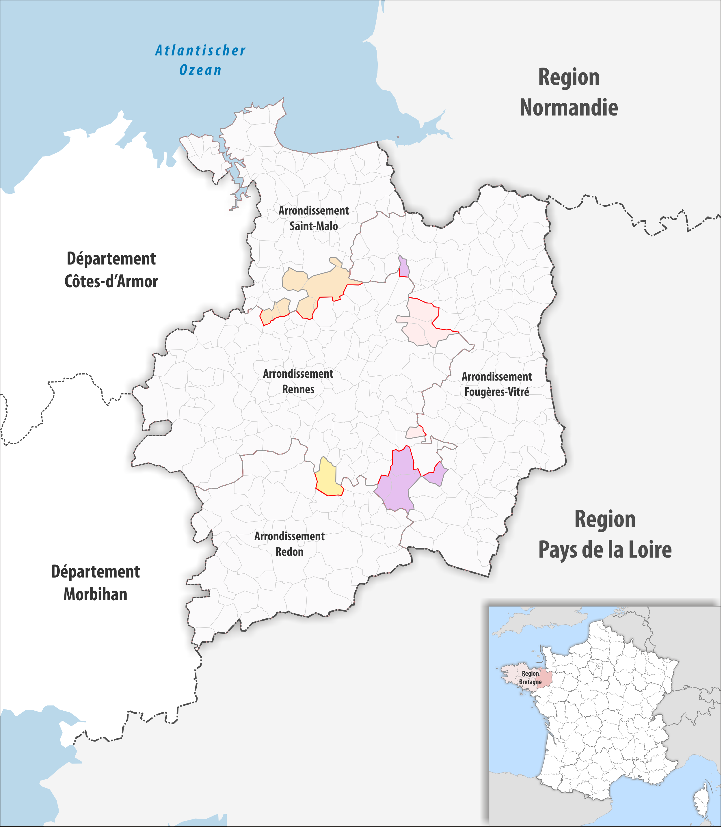 Arrondissements Anpassungen auf 2017 im Departement Ille-et-Vilaine